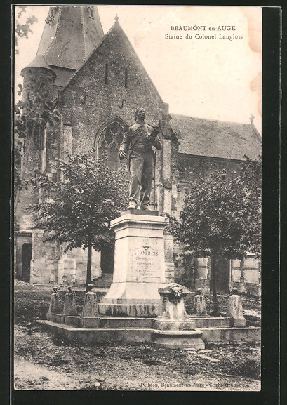 Beaumont-en-Auge, département du Calvados, sur une carte postale de la fin du 19e ou du début du 20e siècle. La statue en bronze de Jean-Charles Langlois réalisée par Louis-Émile Décorchemont. Elle est inaugurée le 30 août 1885 sur la place du colonel Langlois. Elle est déboulonnée et fondue sous le régime de Vichy, dans le cadre de la mobilisation des métaux non ferreux. Le piédestal est resté vide.